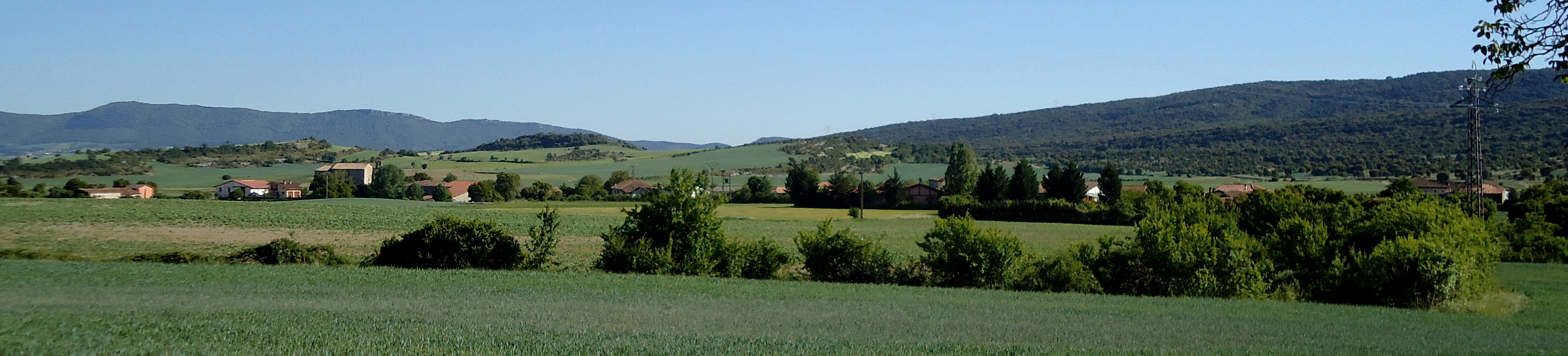 Otobarren herria (Gasteiz)